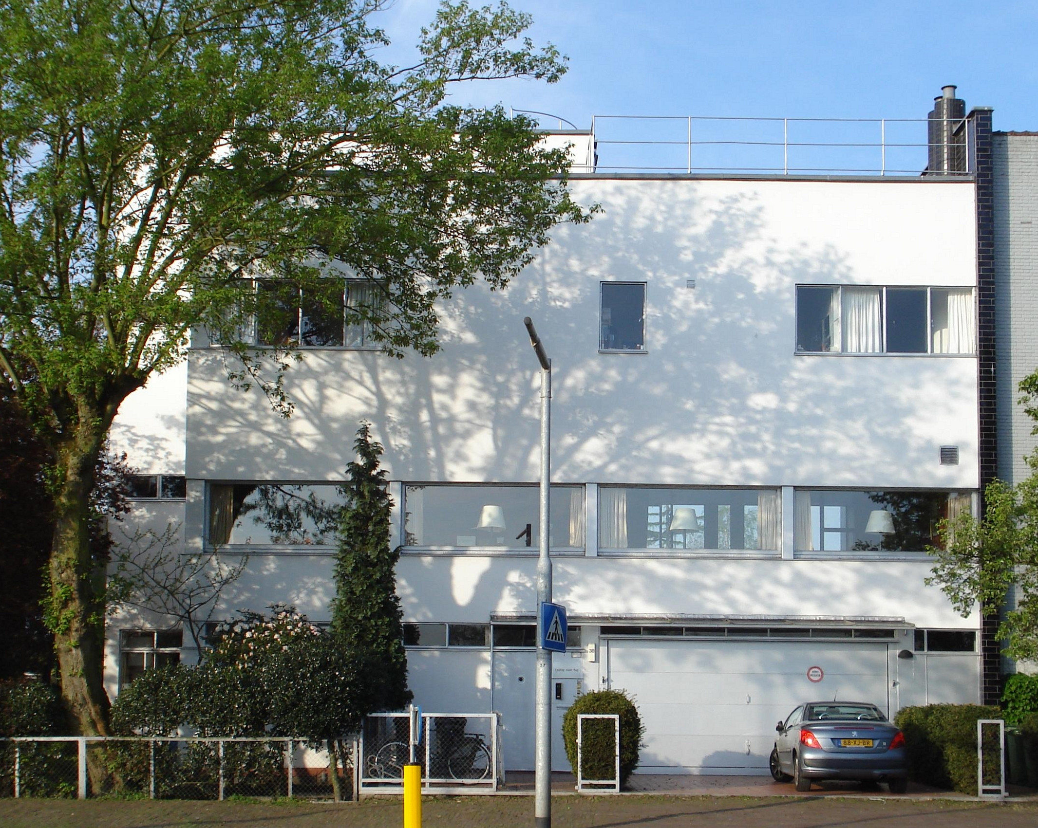 Rotterdam, Kralingse Plaslaan 38. Rijksmonument.